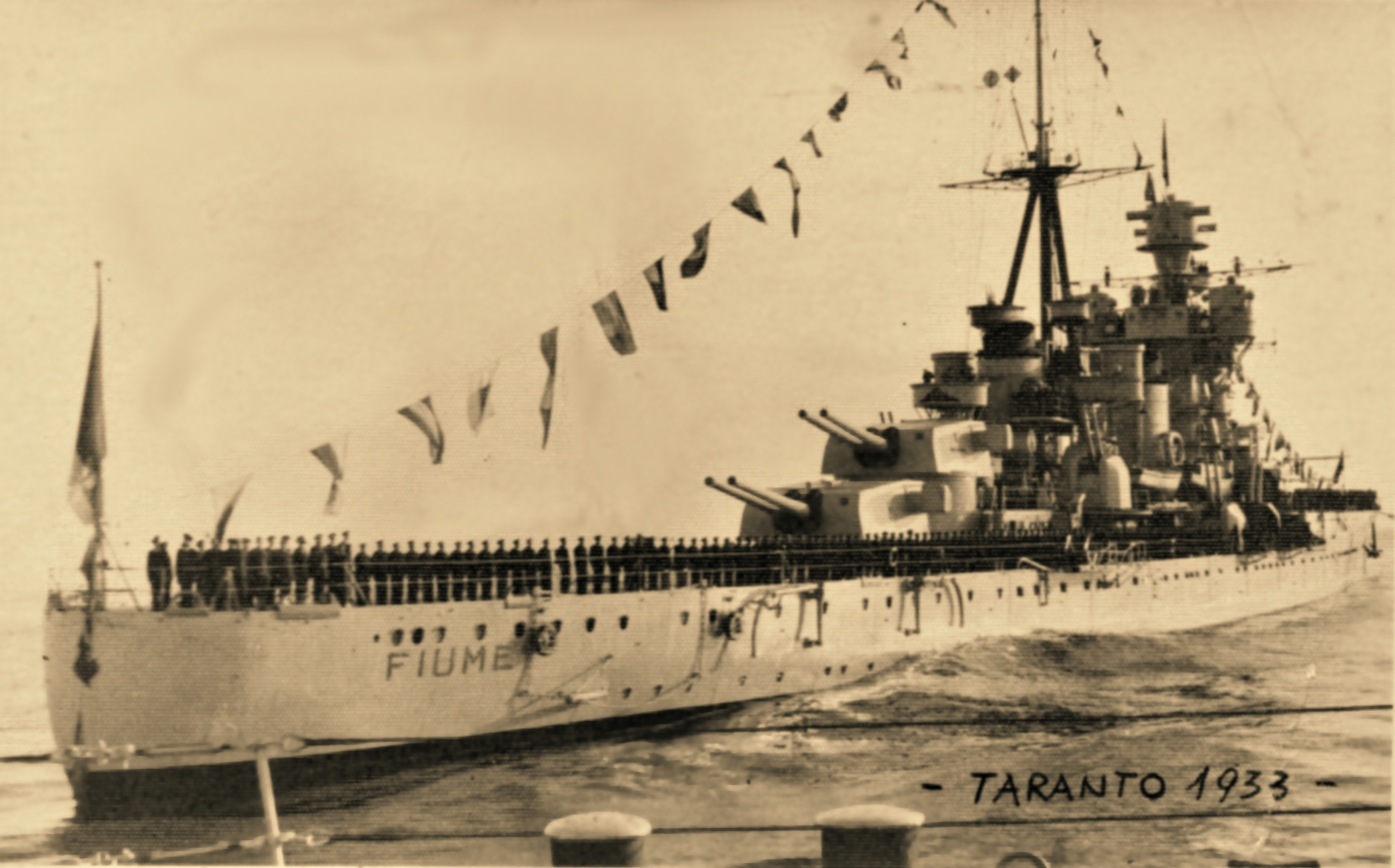 Regia Nave Fiume (Taranto, 1933).